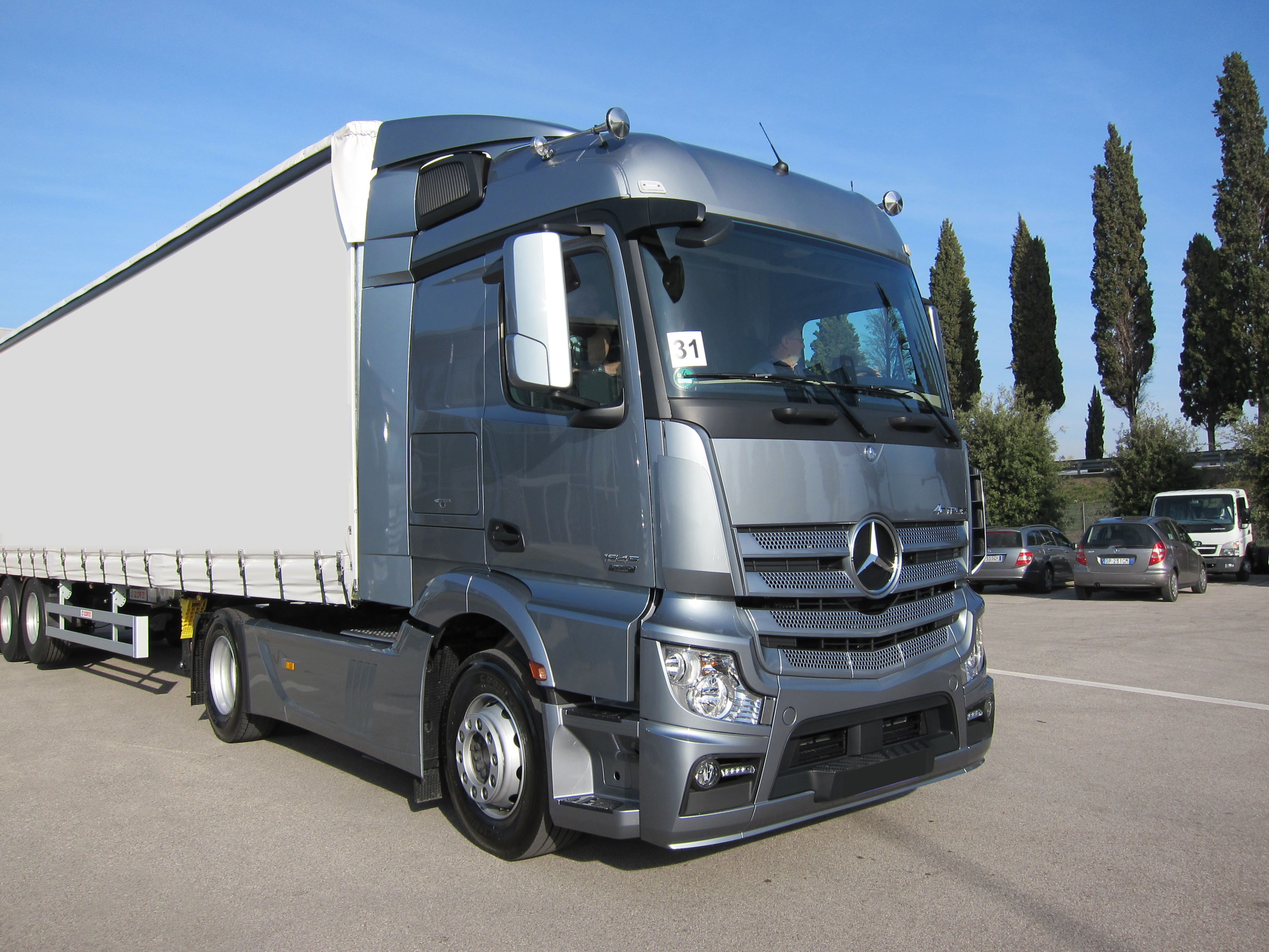 La quarta serie dell’Actros presentata in Italia nel novembre 2011